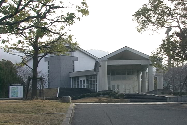 奈良教育大学のシンボル的存在の講堂(通称：パルテノン) 2007年3月18日早朝、撮影したビデオ動画からの静止画像。